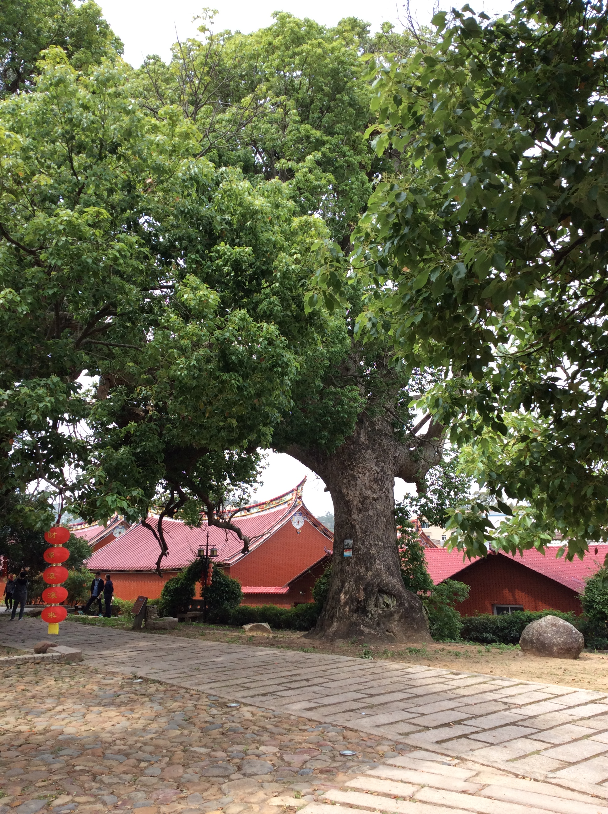 中文（中国大陆）: 漳浦佛昙镇轧内村